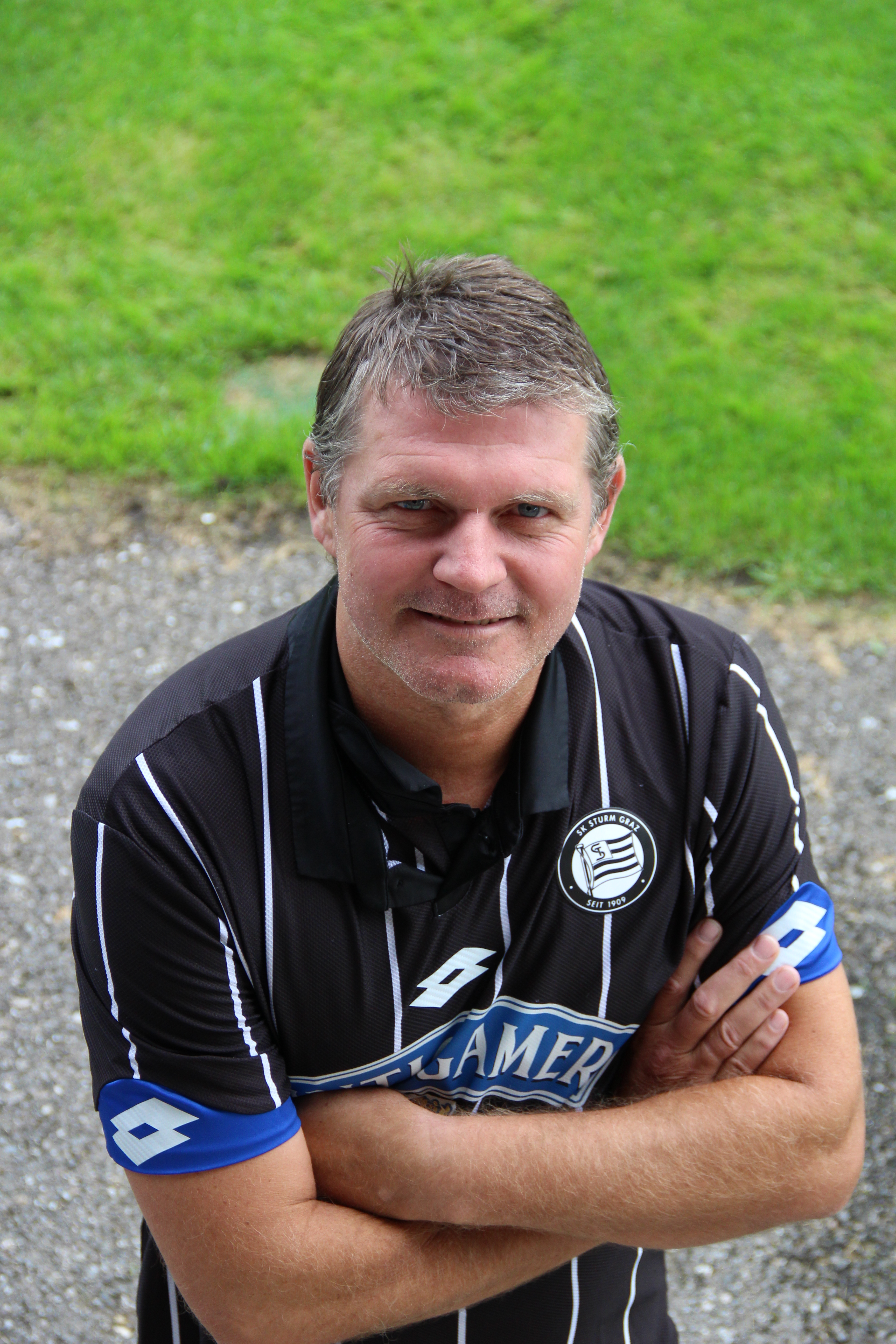 Zeltweger Legendenturnier 2018